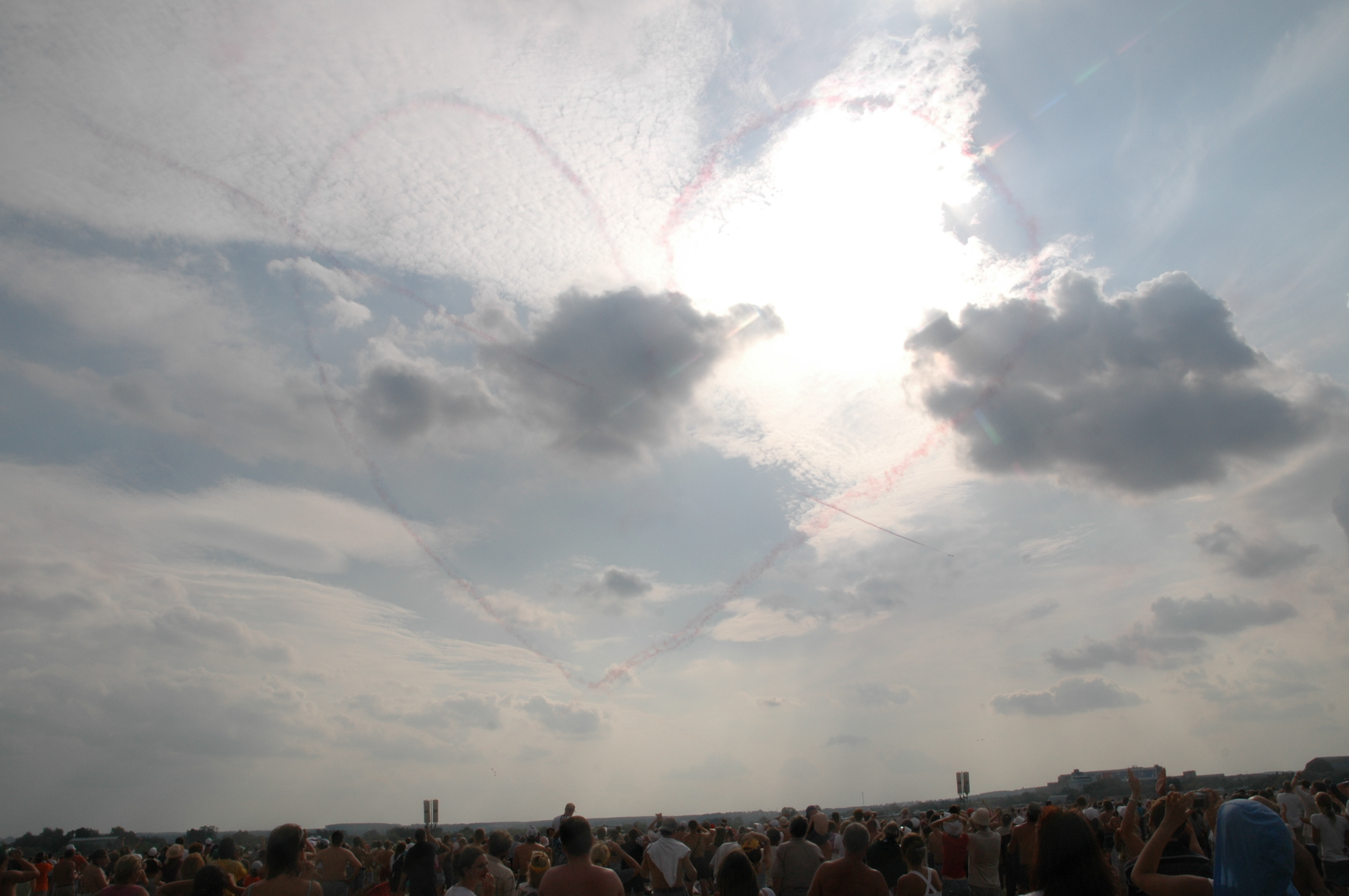 Patrouille de France. Heart. MAKS 2007